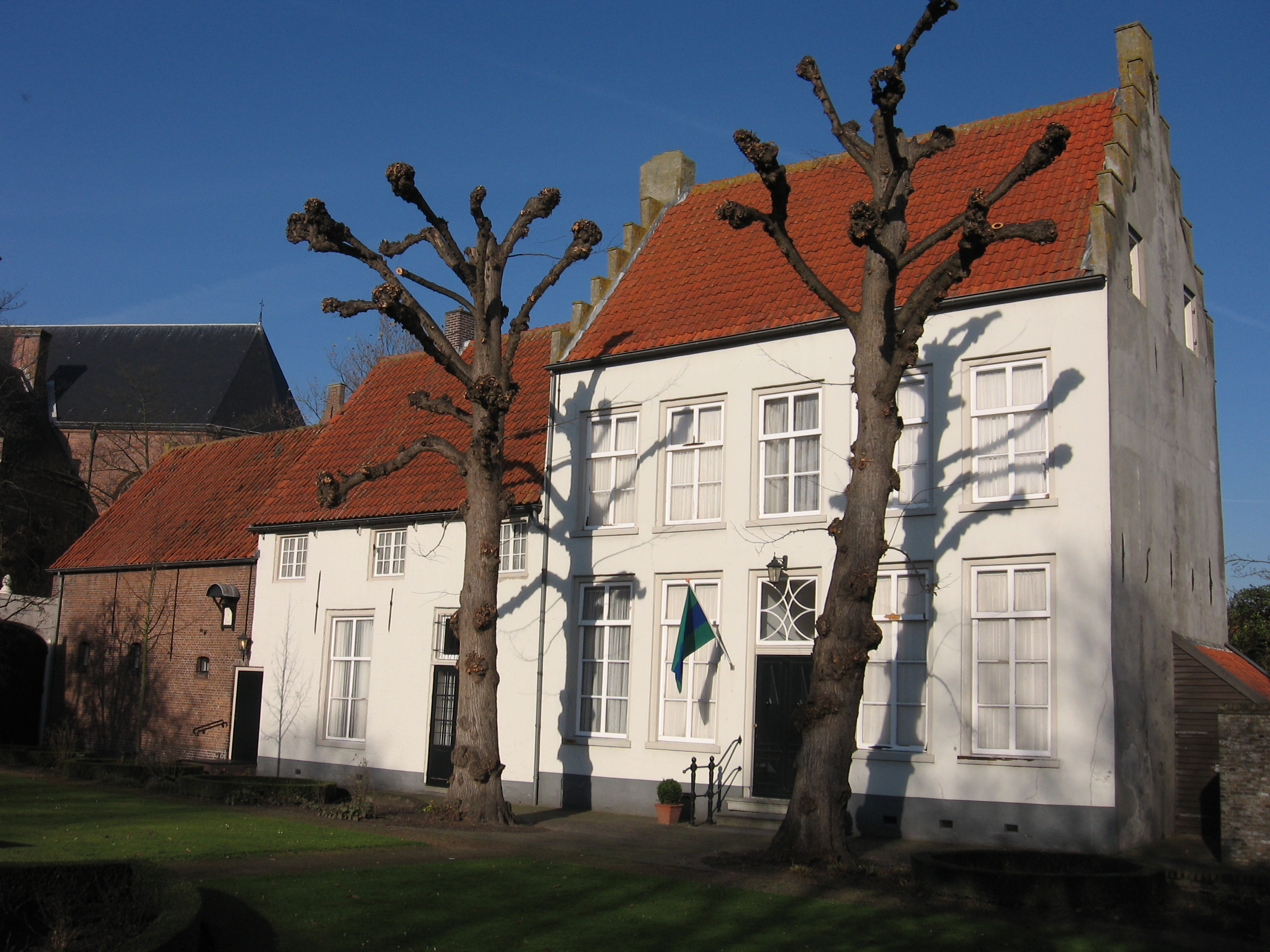 Zicht op een deel van het Gouverneurshuis in Heusden. Tevens het museum voor het Land van Heusden en Altena